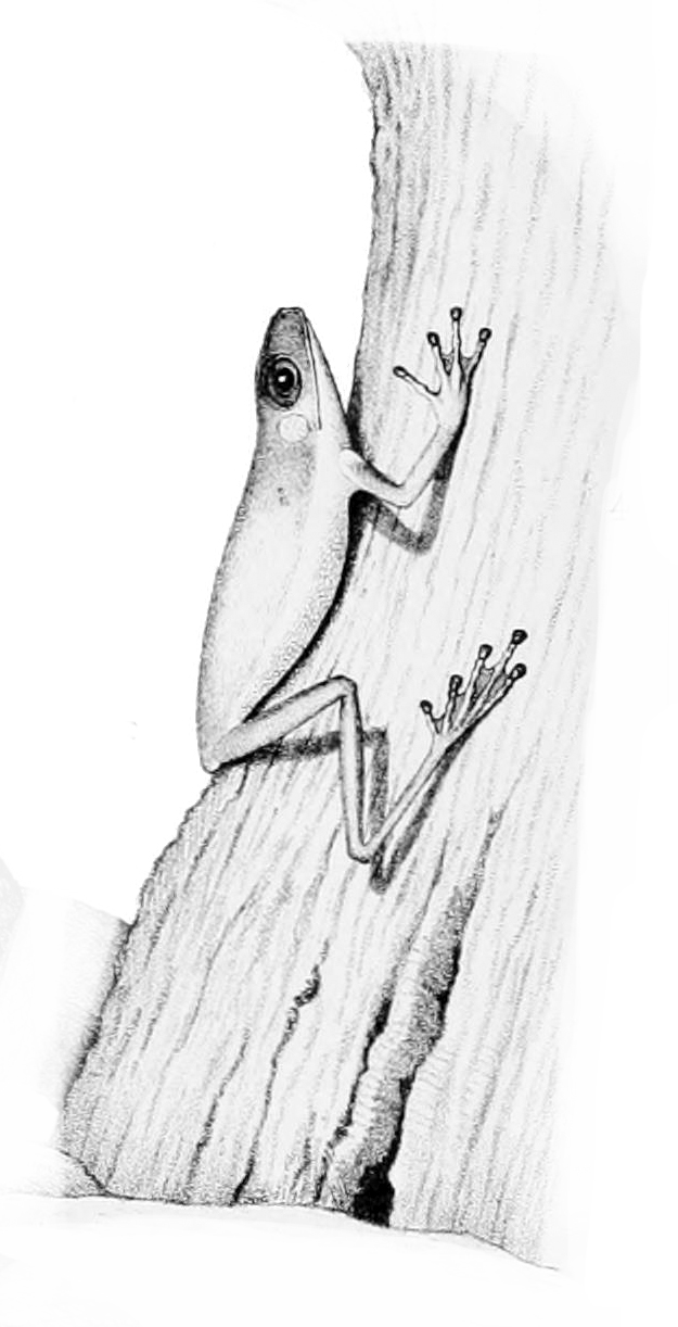 Duellmanohyla uranochroa